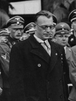 Wien, Arthur Seyß-Inquart, Adolf Hitler Hitler in Wien mit Arthur Seyß-Inquart [Österreich, Wien.- Adolf Hitler mit Reichsstatthalter von Österreich Dr. Arthur Seyß-Inquart. Rechts neben Hitler Heinrich Himmler und Reinhard Heydrich] Abgebildete Personen: Seyß-Inquart, Arthur Dr.: Innenminister, Bundeskanzler, Reichskommissar in NL, Österreich (GND 118764934)